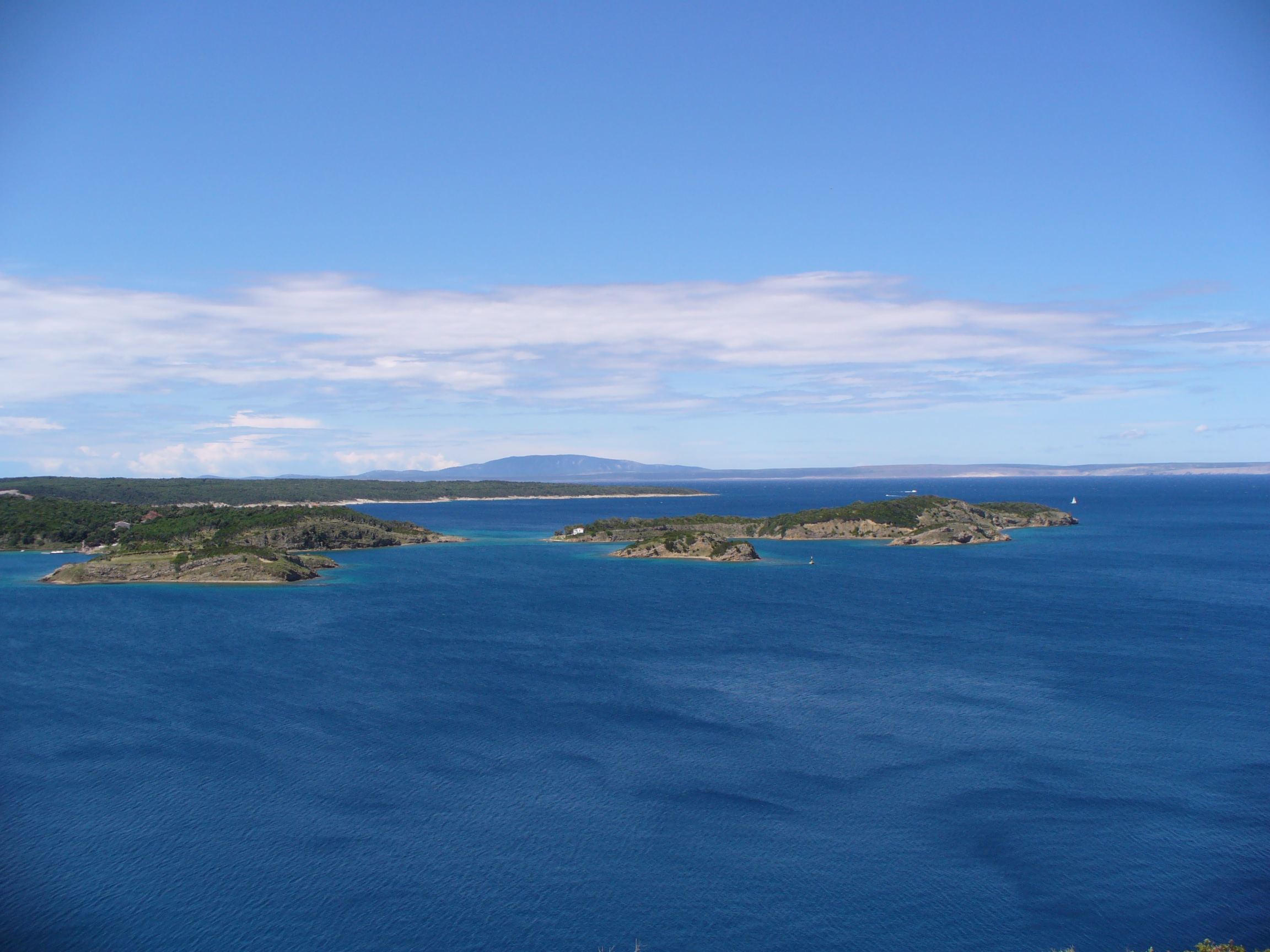 Küste der Insel Rab bei Supertarska Draga. Im Vordergrund sind die Inseln Sailovac, Srednjak und Maman zu sehen.